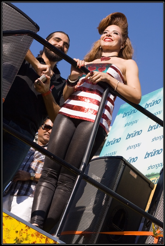 Gloria Trevi durante la Marcha del orgullo gay en Madrid, 2009.